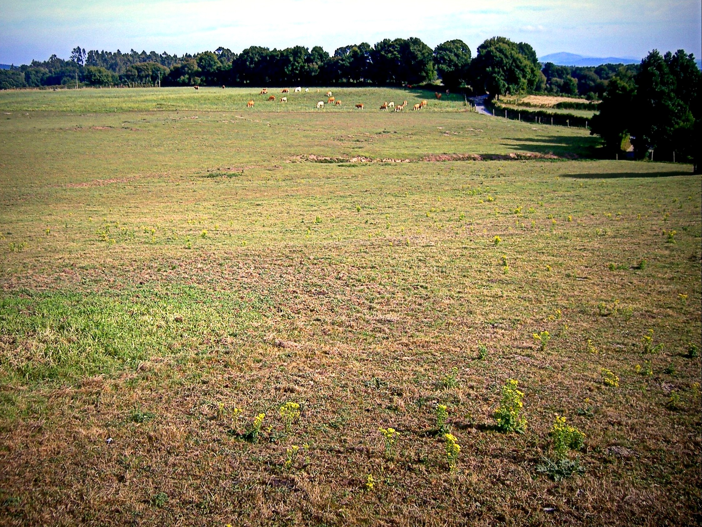 Prados en Xubial, Melide.